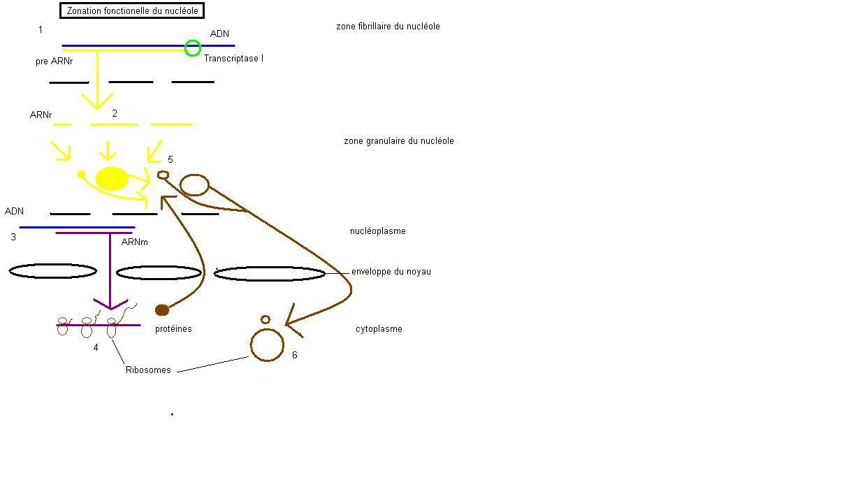 Schéma décrivant la synthèse des ribosomes dans le nucléole, fait sous paint par JCDU78, le 31/08/07